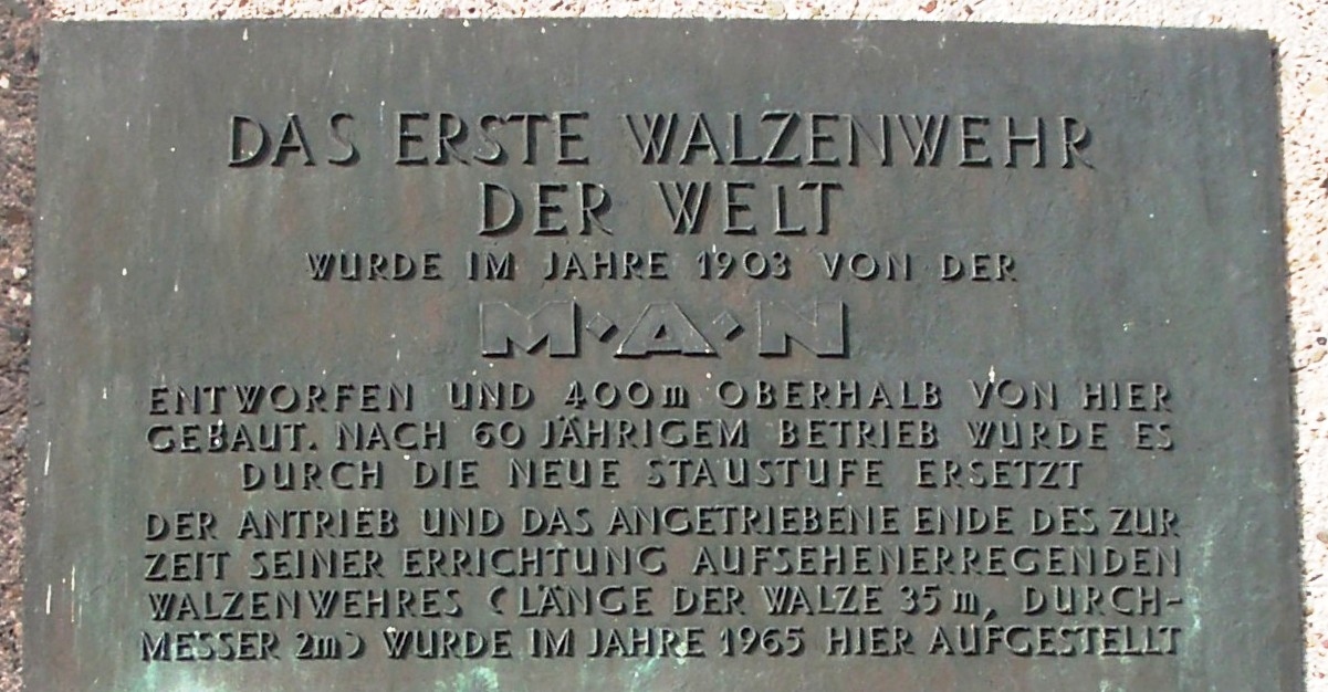 Oberer Teil der Informationstafel am Industriedenkmal "Walzenwehr" in Schweinfurt. Das Denkmal ist Teil des technischen Wanderwegs und steht am nördlichen Mainufer (Gutermann-Promenade).